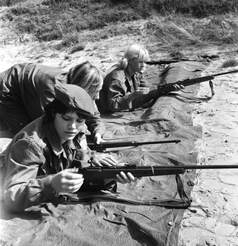 Zentralbild-Kohls 4.8.1967 Zum 15. Jahrestag der GST Mirow: Berliner Sportler im GST-Trainingslager Berliner GST-Sportler bereiten sich gegenwärtig in einem Trainigslager bei Mirow (Bez.Neubrandenburg) auf die III.Zentralen Meisterschaften der GST, die anläßlich des 15. Jahrestages der Gesellschaft für Sport und Technik in Neubrandenburg stattfinden werden, intensiv vor.Nach einem 1500 m Lauf absolvieren die drei Mädchen Angelika Schulz,Britta Drese und Heidrun Hoffmann (von vorn nach hinten) eine zünftige Schießausbildung.